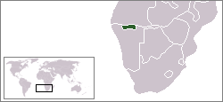 Description:Carte de localisation du bantoustan du Ovamboland, Namibie Auteur:Rémih